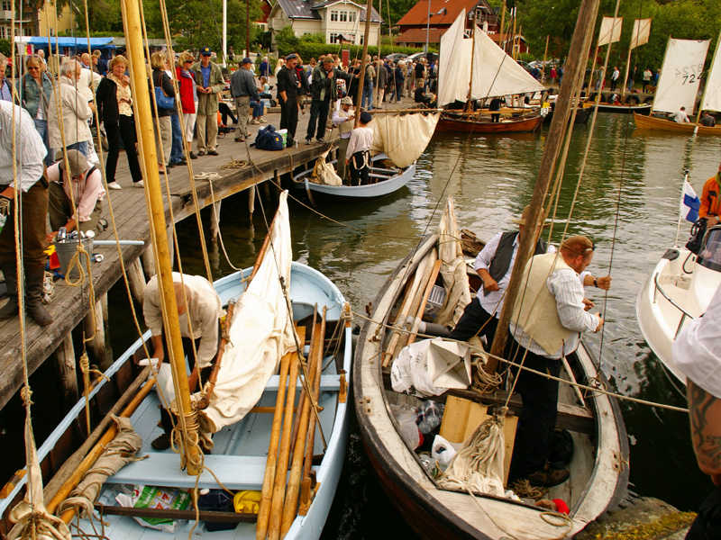 Postrodden 2011 i Grisslehamn